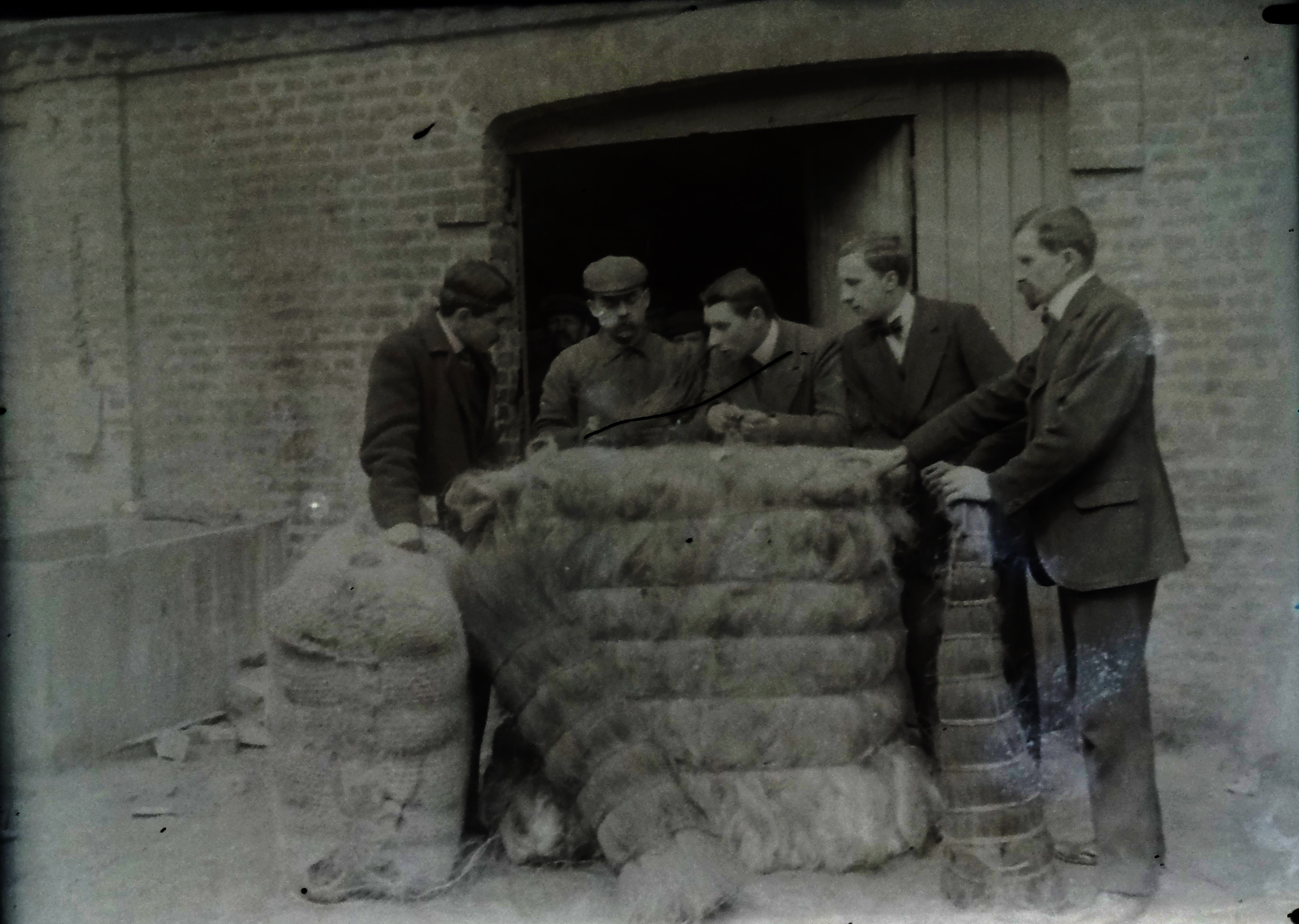 photographie représentant la fabrication du coton